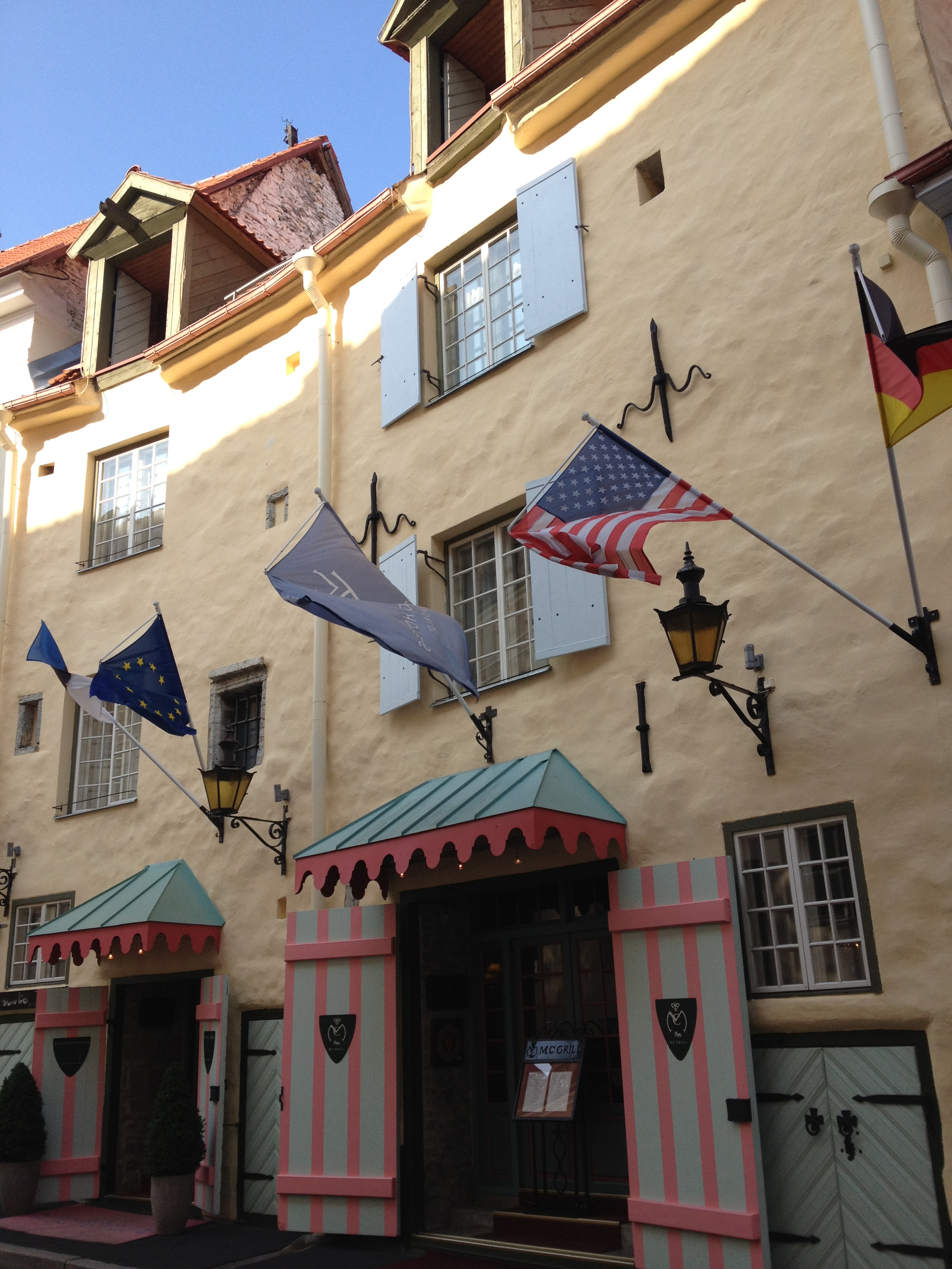 Ait Pühavaimu tn13, 14.-20.saj.